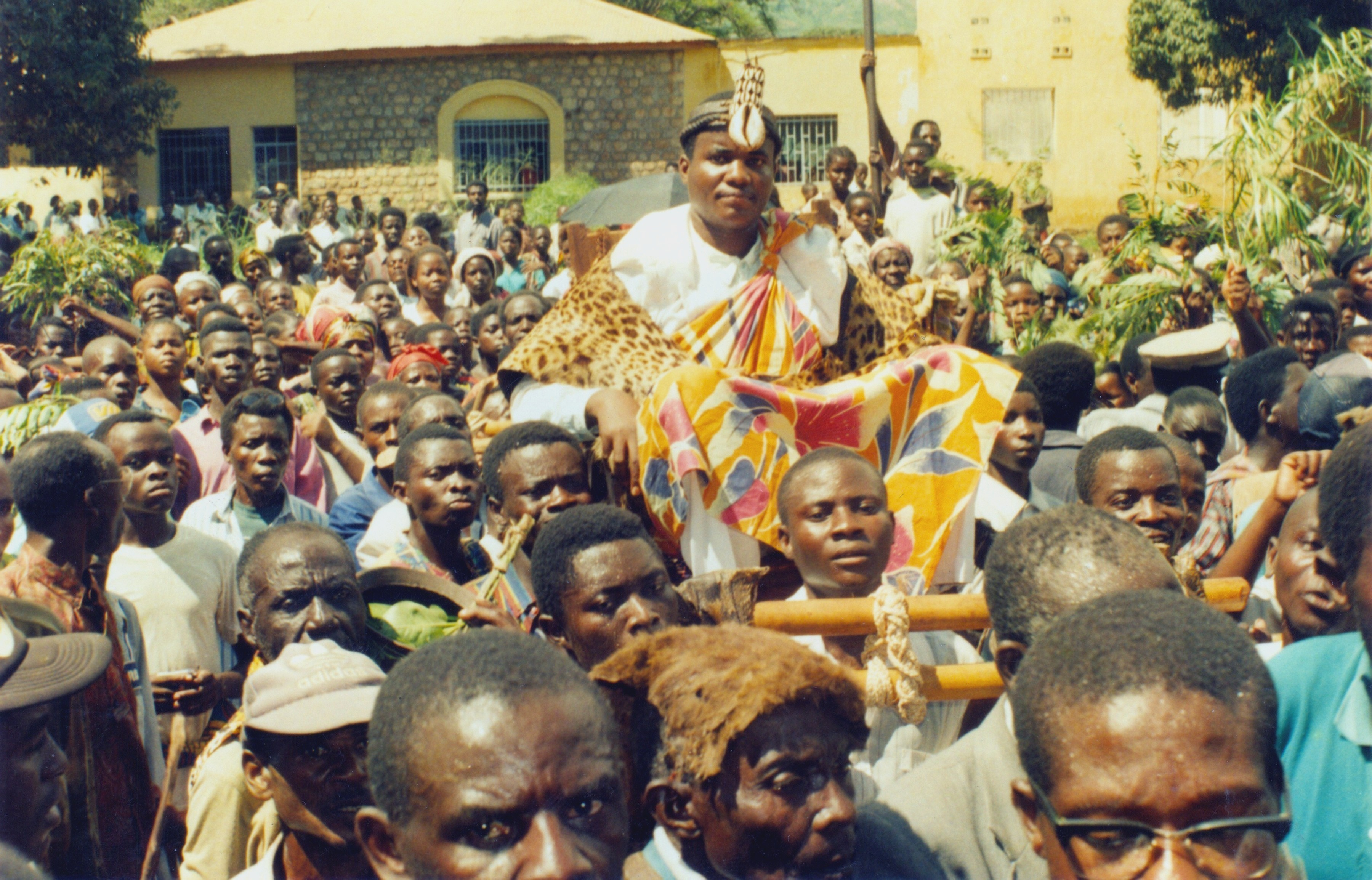 Mwami Lwegeleza III en petit format